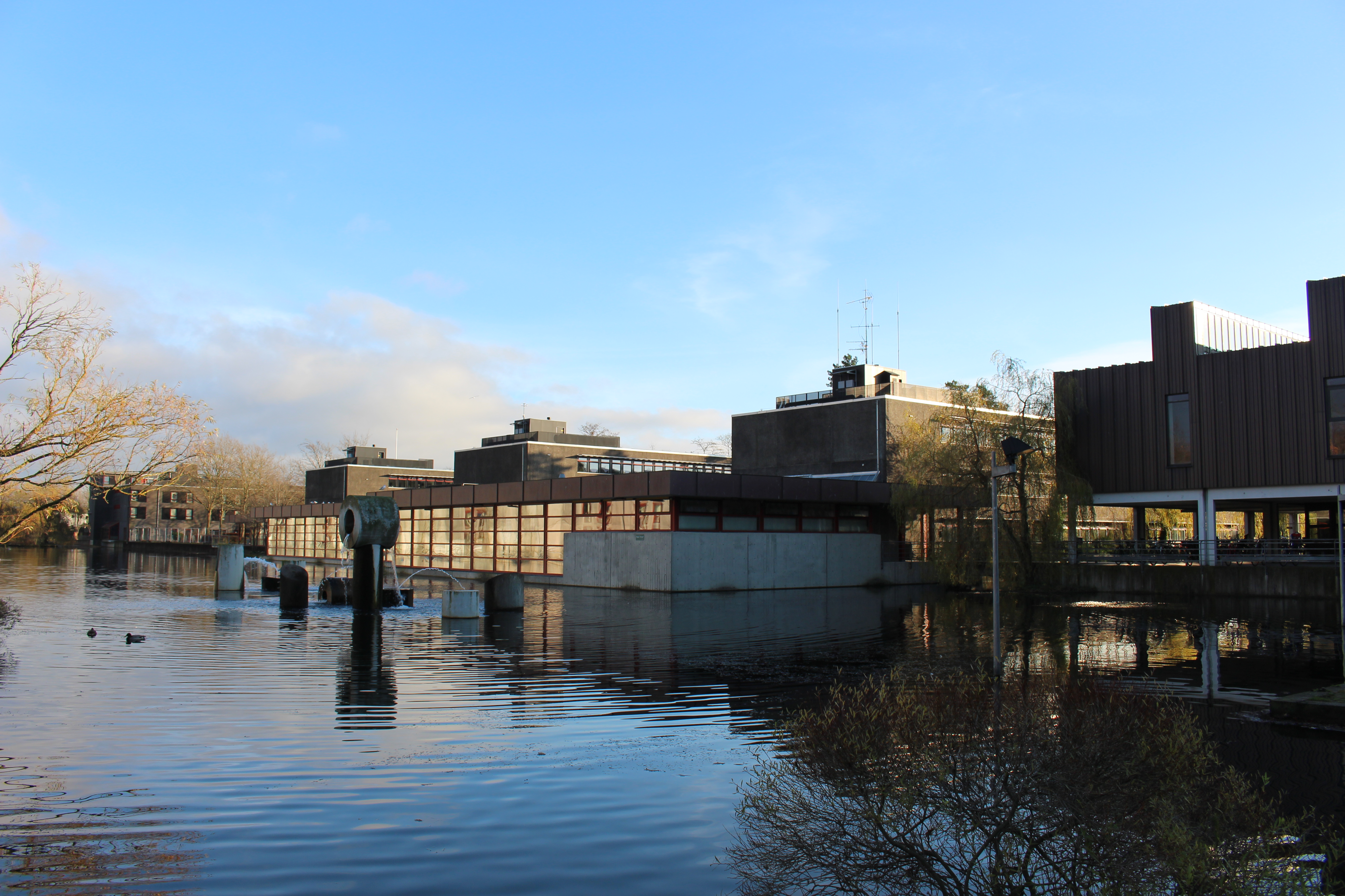 Albertslund Rådhus